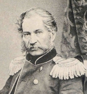 Ковалевский, Егор Петрович (1809/1811-1868) — русский путешественник и писатель, член-корреспондент и почётный член Петербургской Академии наук.